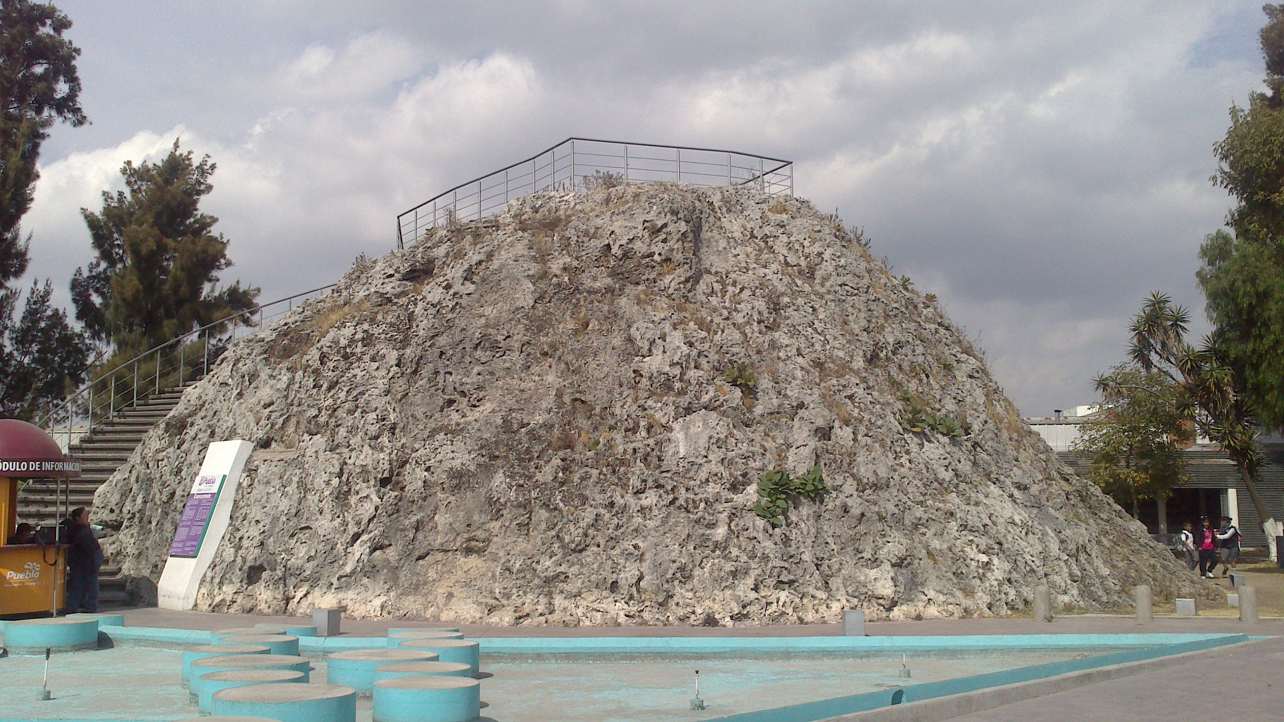 Vista completa del Volcán Cuexcomate, Puebla, México.